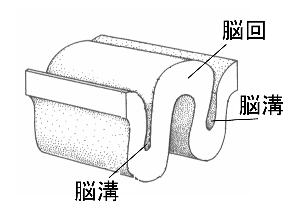 gyrus en sulci, japanese version.